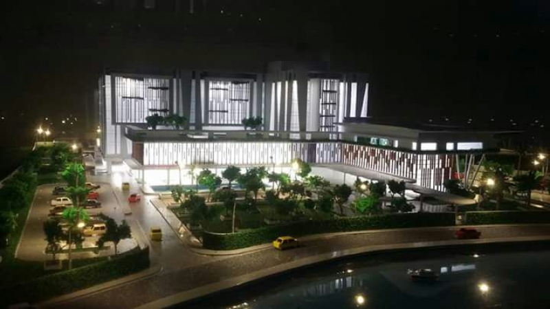 Model RSUP Ambon yang akan melayani Maluku.